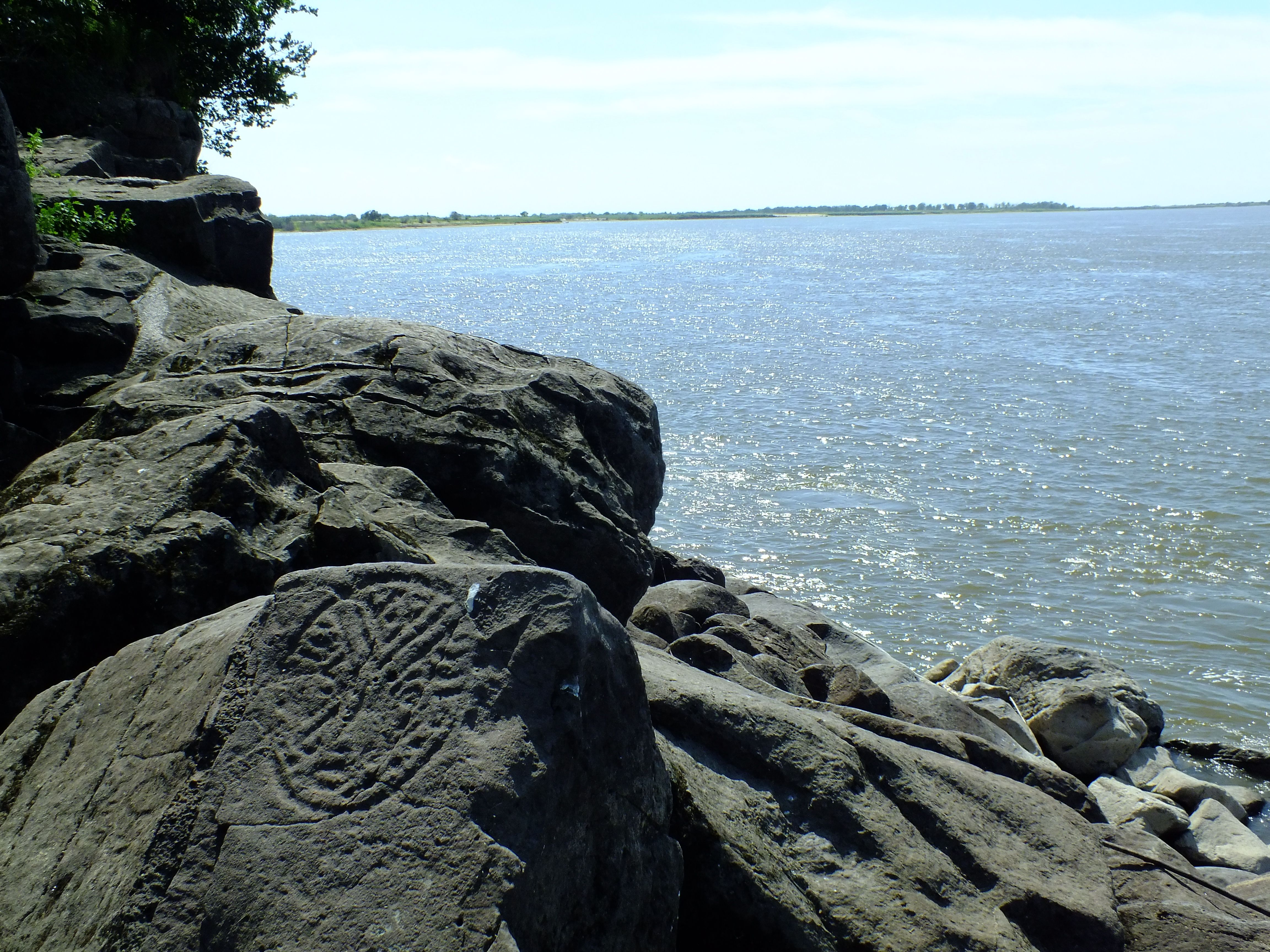 Petroglif of Sikachi-Alyan